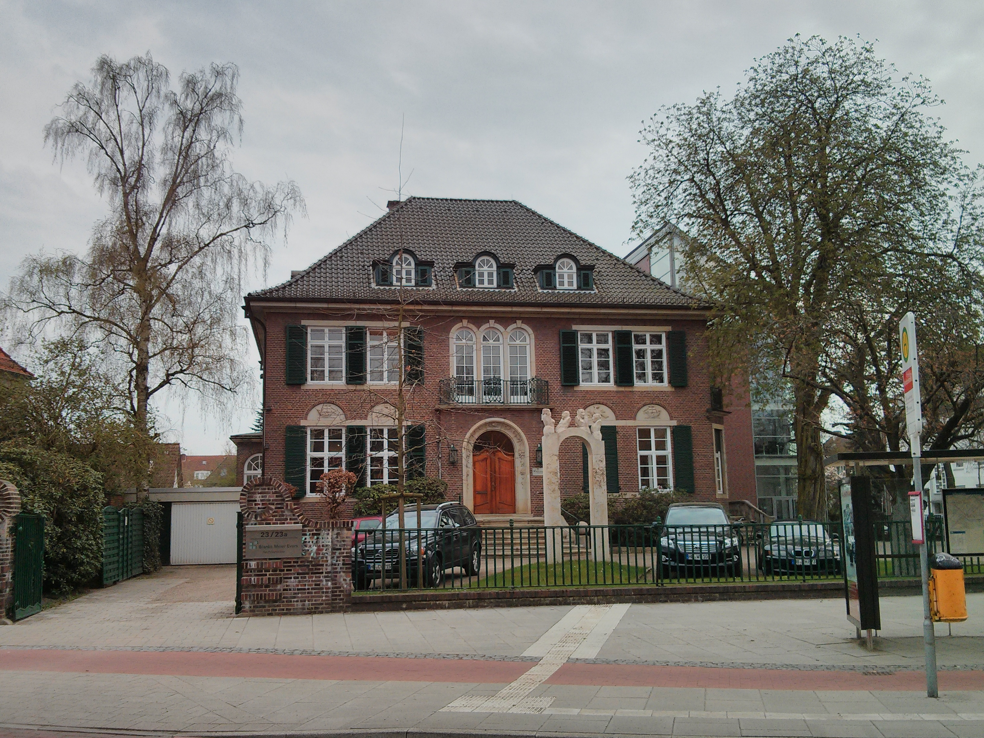 Haus Ritter in Bremen, Kurfürstenallee 23 Das abgebildete Objekt ist ein geschütztes Kulturdenkmal in der Freien Hansestadt Bremen, mit der Nr. 0822 beim Landesamt für Denkmalpflege registriert.